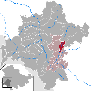 Schwarza in Thuringia - District Schmalkalden-Meiningen